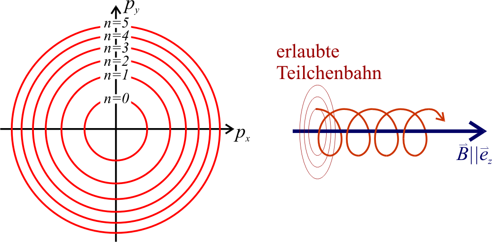 Landau-Niveaus